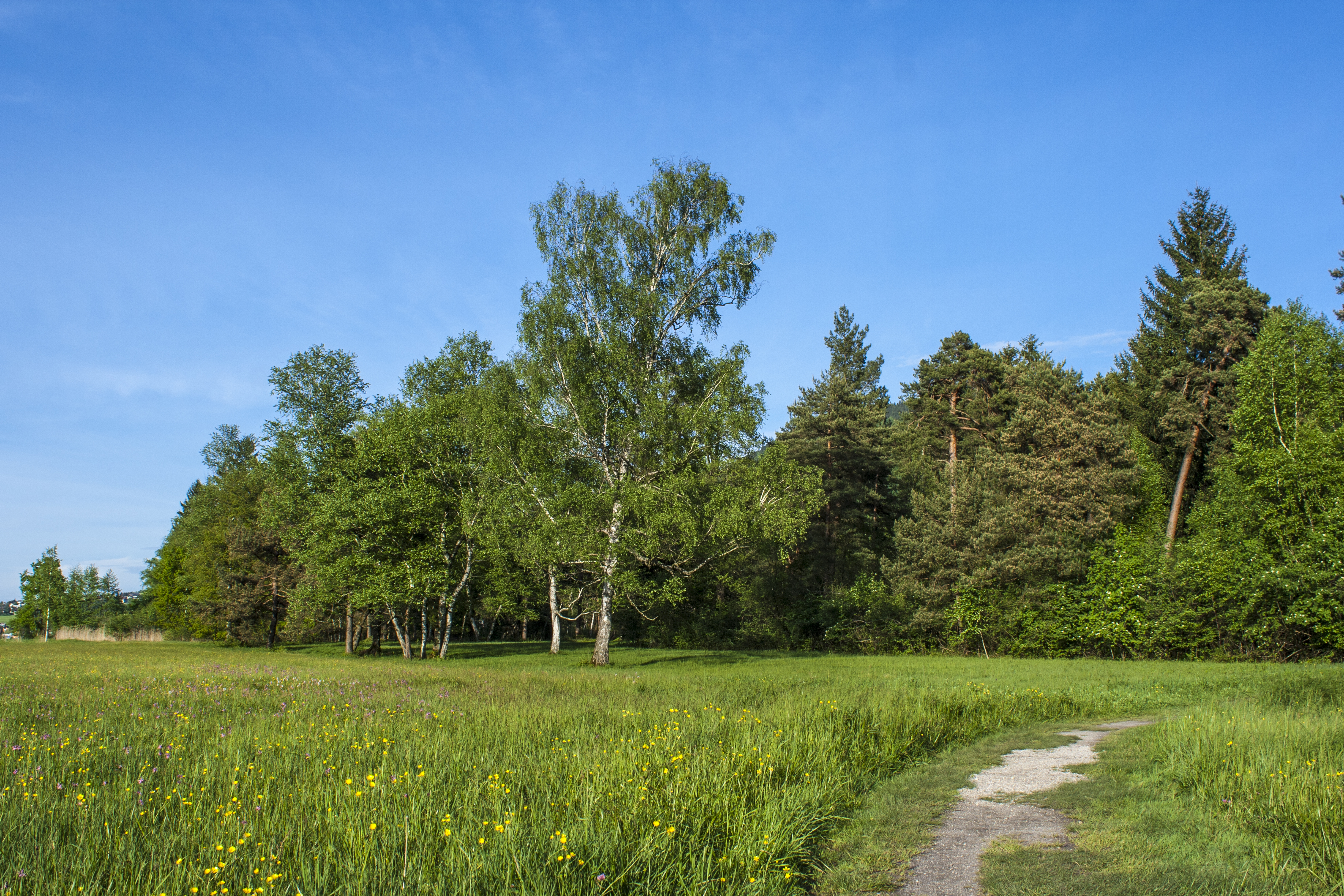 Samer Mösl This media shows the Geschützter Landschaftsteil in Salzburg with the ID GLT00093.